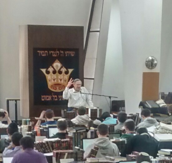 הרב משה ליכטנשטיין ראש ישיבת הר עציון מעביר שיעור כללי